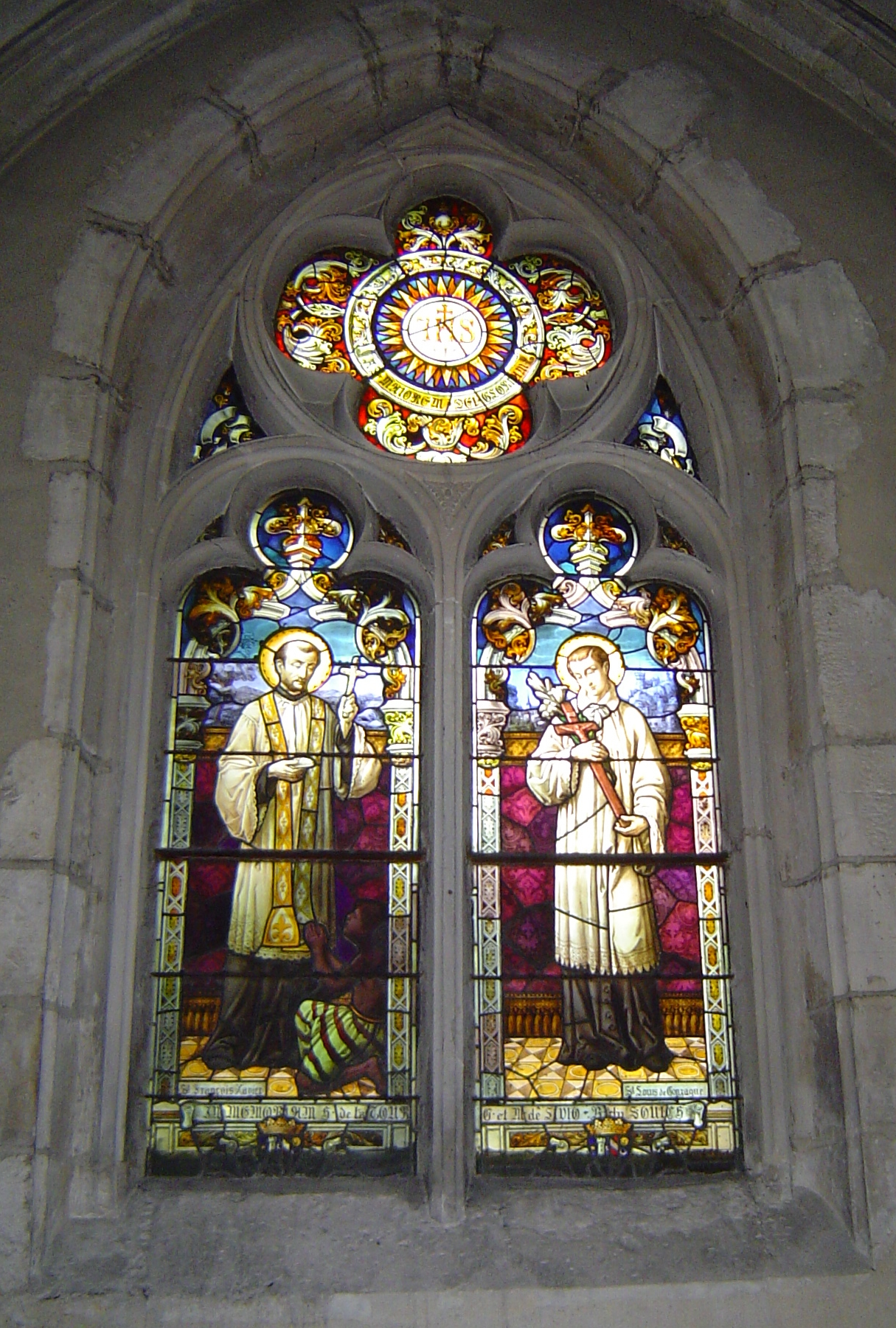 Église Saint-Saturnin d'Antony (92). Vitrail de Saint-François-Xavier et Saint-Louis-de-Gonzagues.